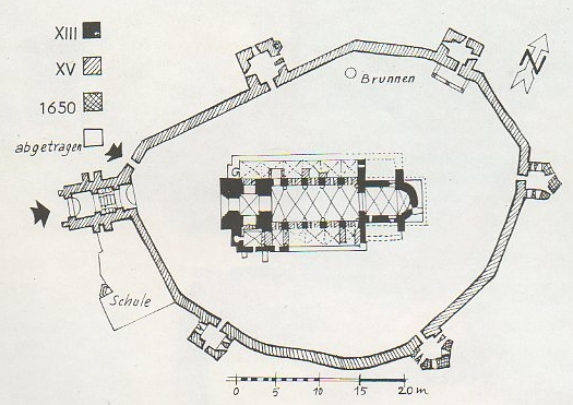 Planul fortificatiei din Drauseni.